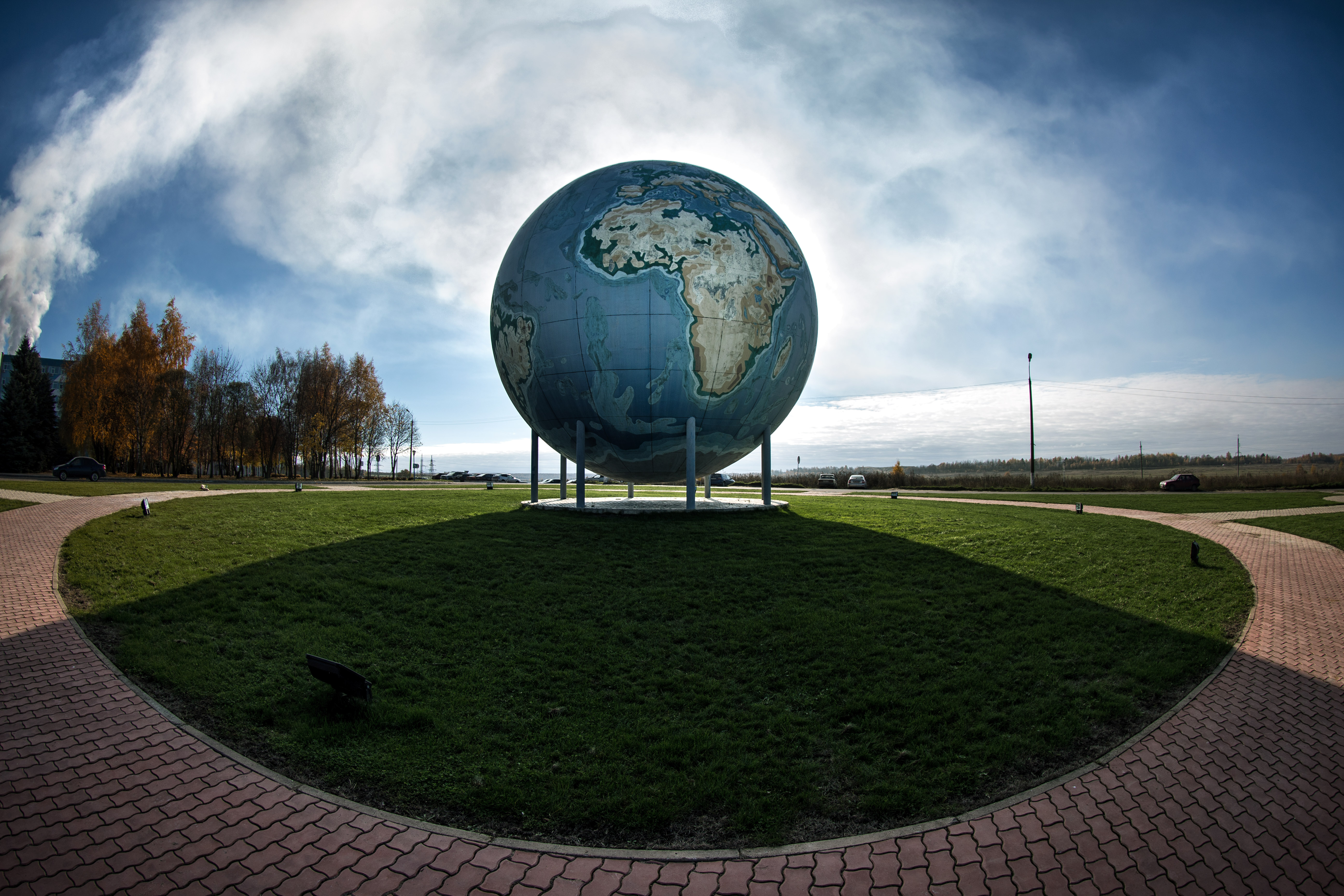 Самый большой в Европе (второй в мире, после расположенного в Нью-Йорке Donald Trumps Globe) глобус находится в Дорогобуже.Создан в 2007 году. Оформление — смоленских художников под руководством Михаила Шведова. 12 метров в высоту, 10,5 метра в диаметре, весит 12 тонн.